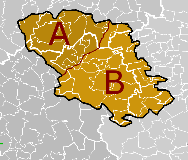 Poloha a členění geomorfologického celku Džbán na podkladové mapě územněsprávního členění pomezí okresů Rakovník, Louny a Kladno. Hercynský systém Hercynská pohoří I Česká vysočina I5 (V) Poberounská subprovincie I5A (VA) Brdská oblast I5A-1 (VA1) Džbán I5A-1-A (VA1-A) Ročovská vrchovina I5A-1-B (VA1-B) Řevničovská pahorkatina